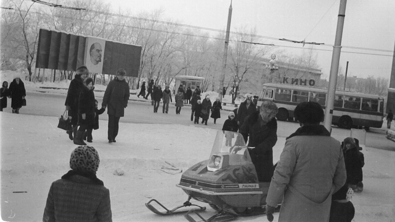 Снегоход Лайка-2, Хабаровск, Новый год 1980-1981 год